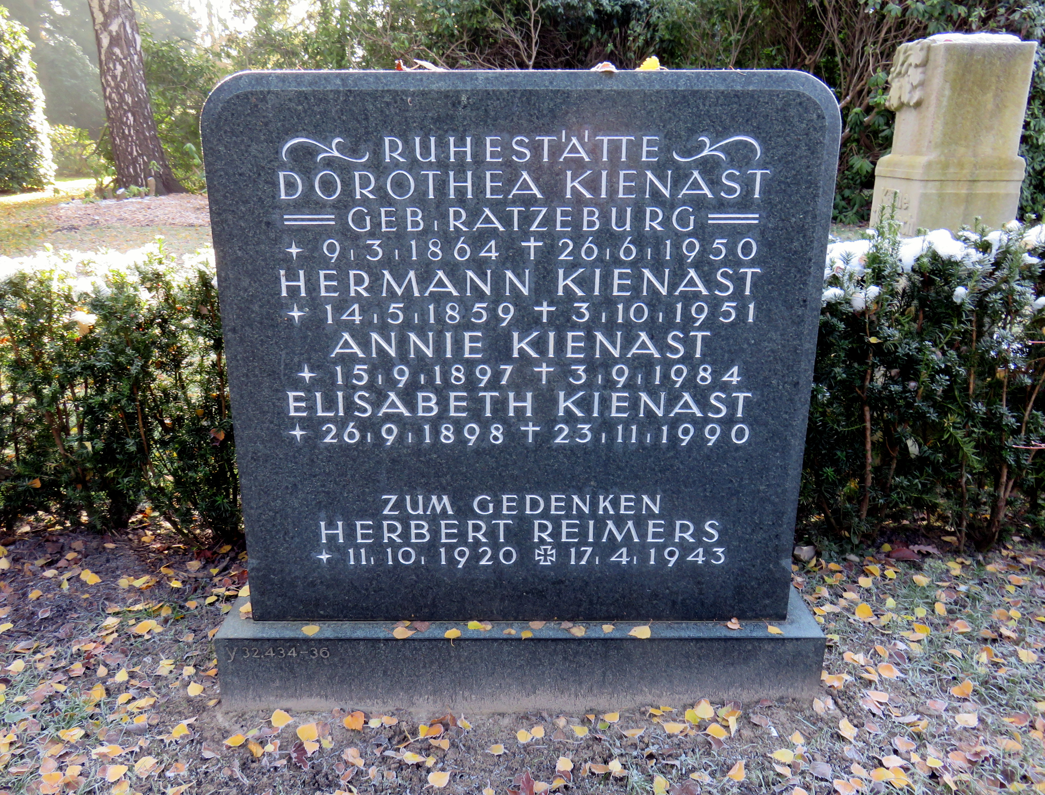 Historischer Grabstein der Hamburger Politikerin Annie Kienast im Bereich des Gartens der Frauen auf dem Ohlsdorfer Friedhof in Hamburg-Ohlsdorf.